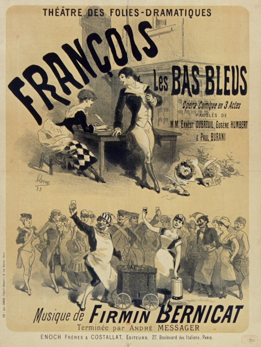 Théâtre des Folies-Dramatiques. François les Bas bleus... Musique de Firmin Bernicat, terminée par André Messager. Enoch Frères et Costallat Editeurs, lithographic poster designed by Jules Chéret, printed by Chaix (Paris).